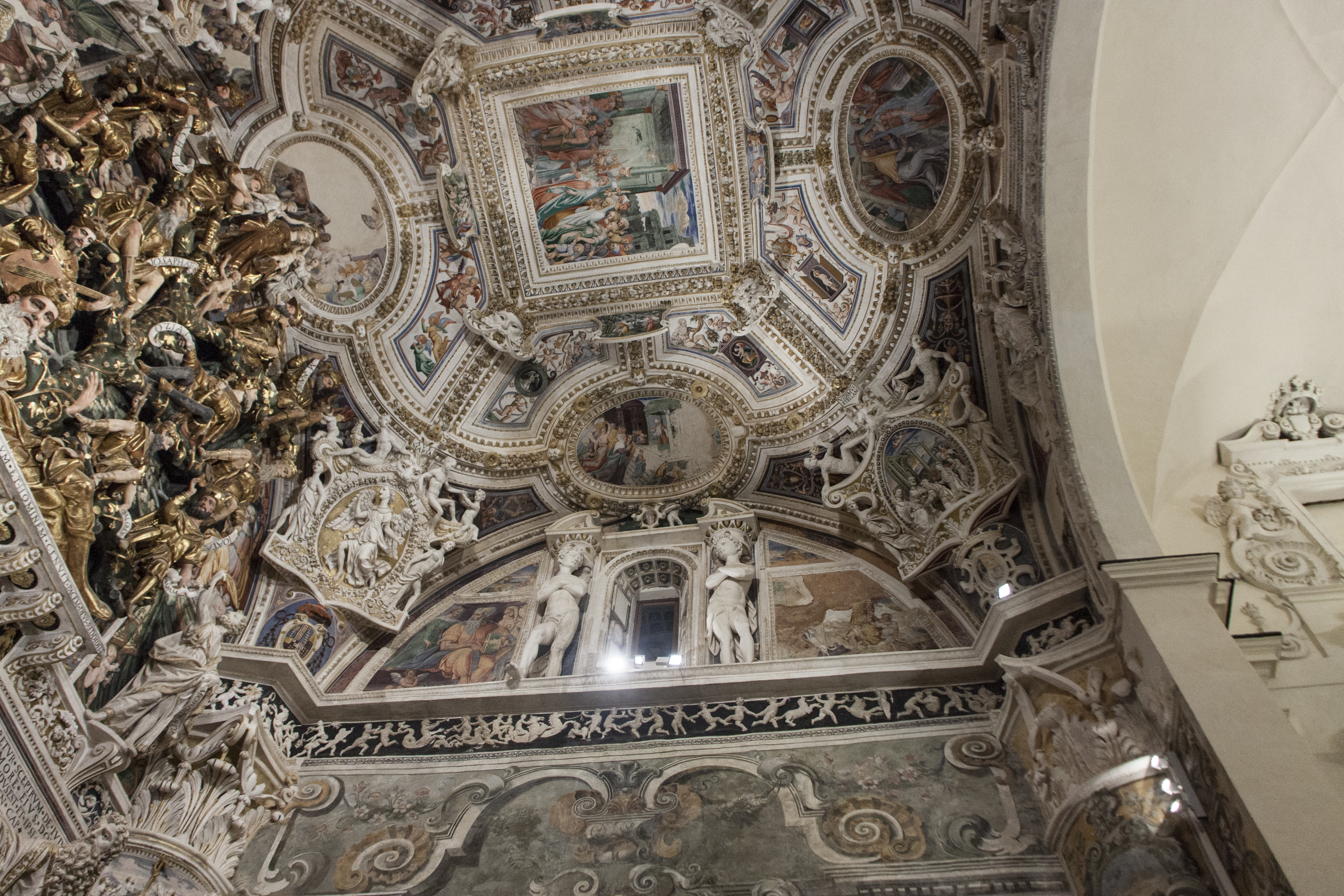 Chiesa di San Domenico (Castelvetrano)